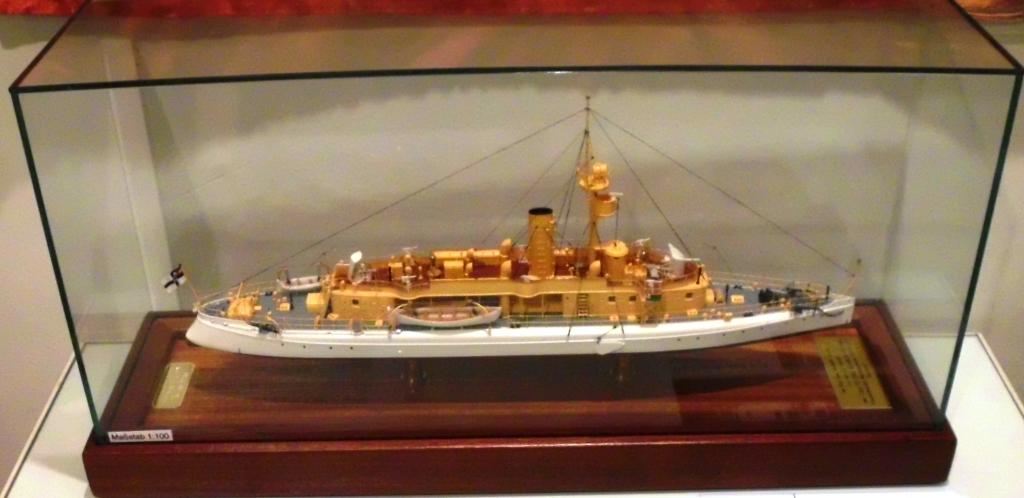 Modell vom Flußkanonenboot Vaterland